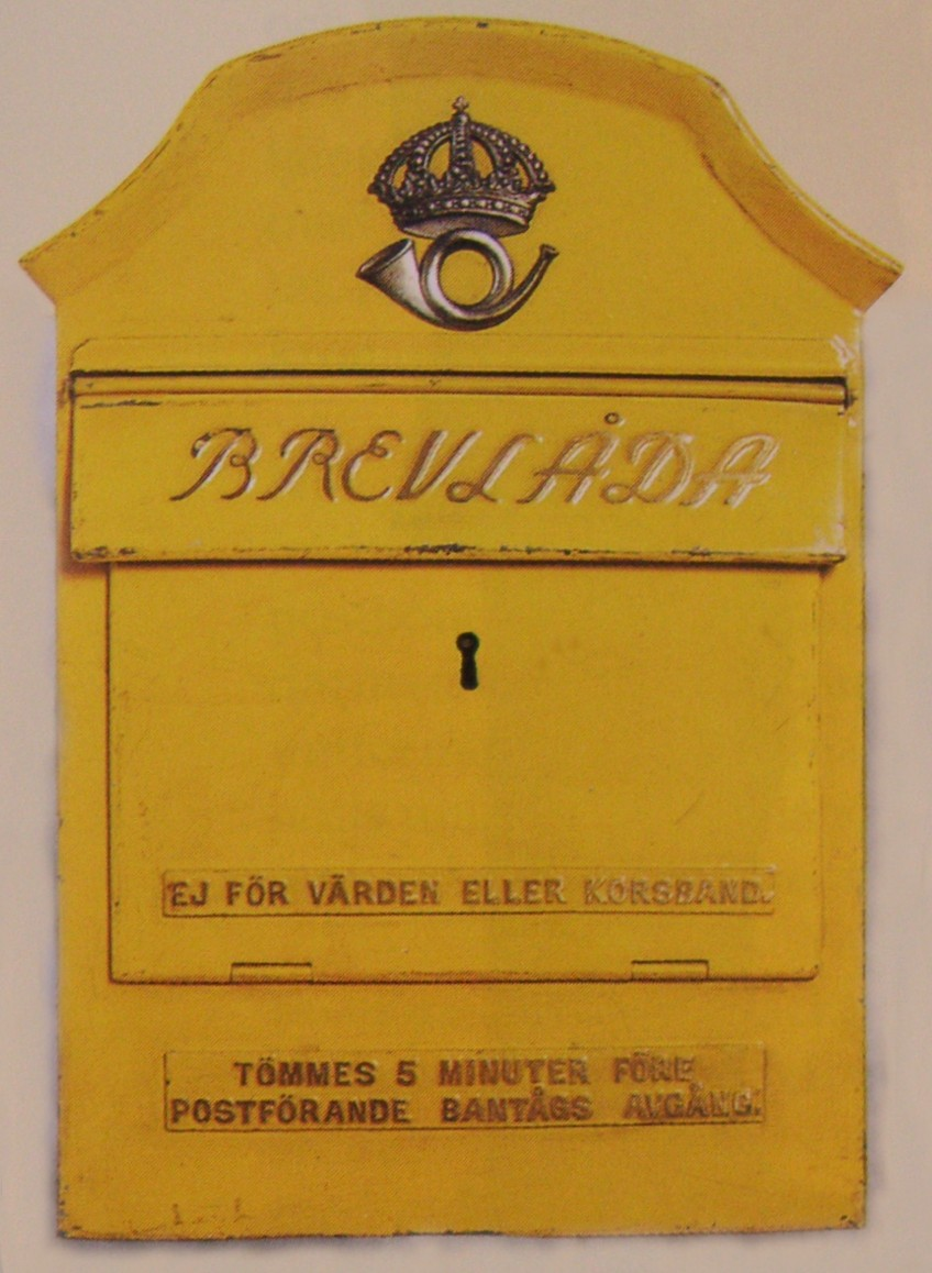 Svensk postlåda från 1905, design Ragnar Östberg